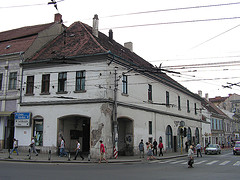 Cluj-Napoca, Muzeul de Istorie a Farmaciei (Casa Mauksch-Hintz), Piaţa Unirii nr.28